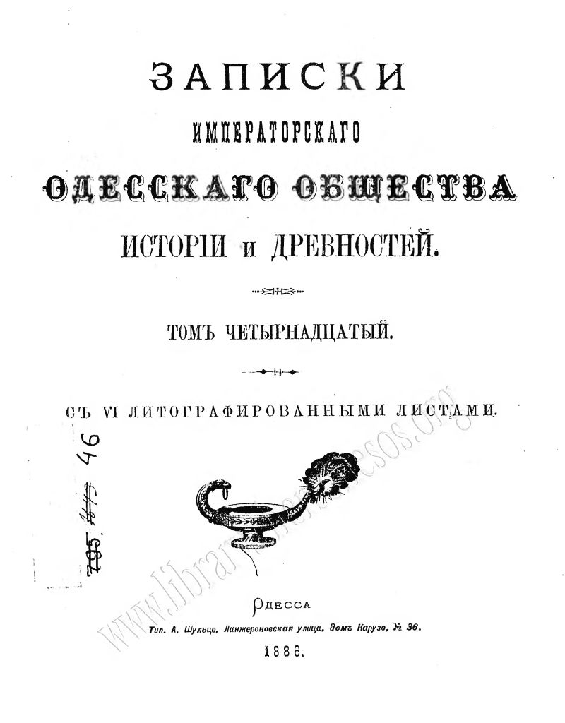 Записки Одесского общества истории и древностей